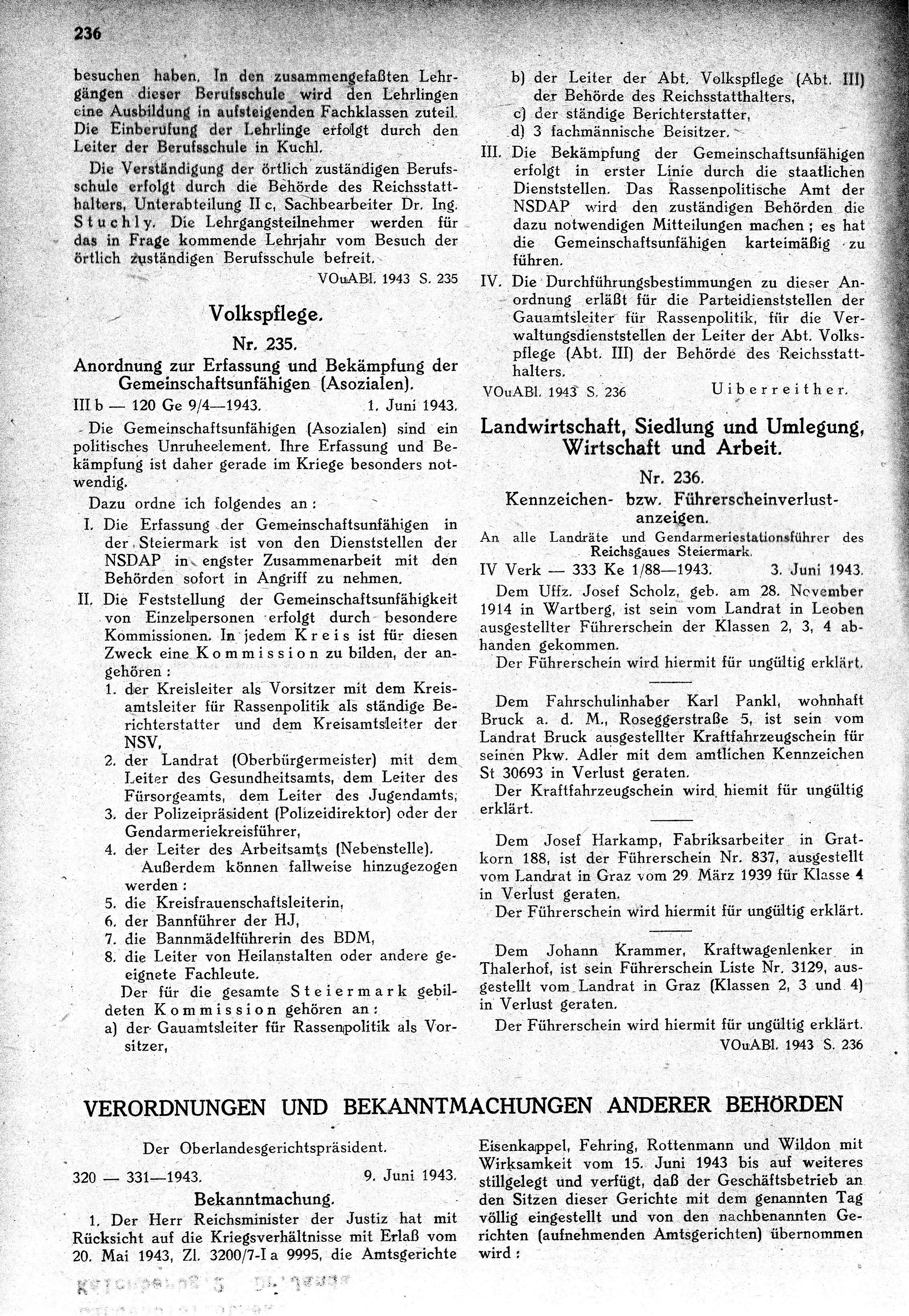 Verordnungs- und Amtsblatt für den Reichsgau Steiermark 1943, S. 236/237: Anordnung zur Erfassung und Bekämpfung der Gemeinschaftsunfähigen (Asozialen); Stillegung bzw. Einschränkung des Betriebes von Amtsgerichten (Bezirksgerichten) in der Steiermark und in Kärnten ab 15. Juni 1943. Beginn des Erlasses am unteren Blattteil, die Aufzählungen befinden sich auf der Folgeseite File:Gerichtsorganisation Stmk 1943-2.jpg